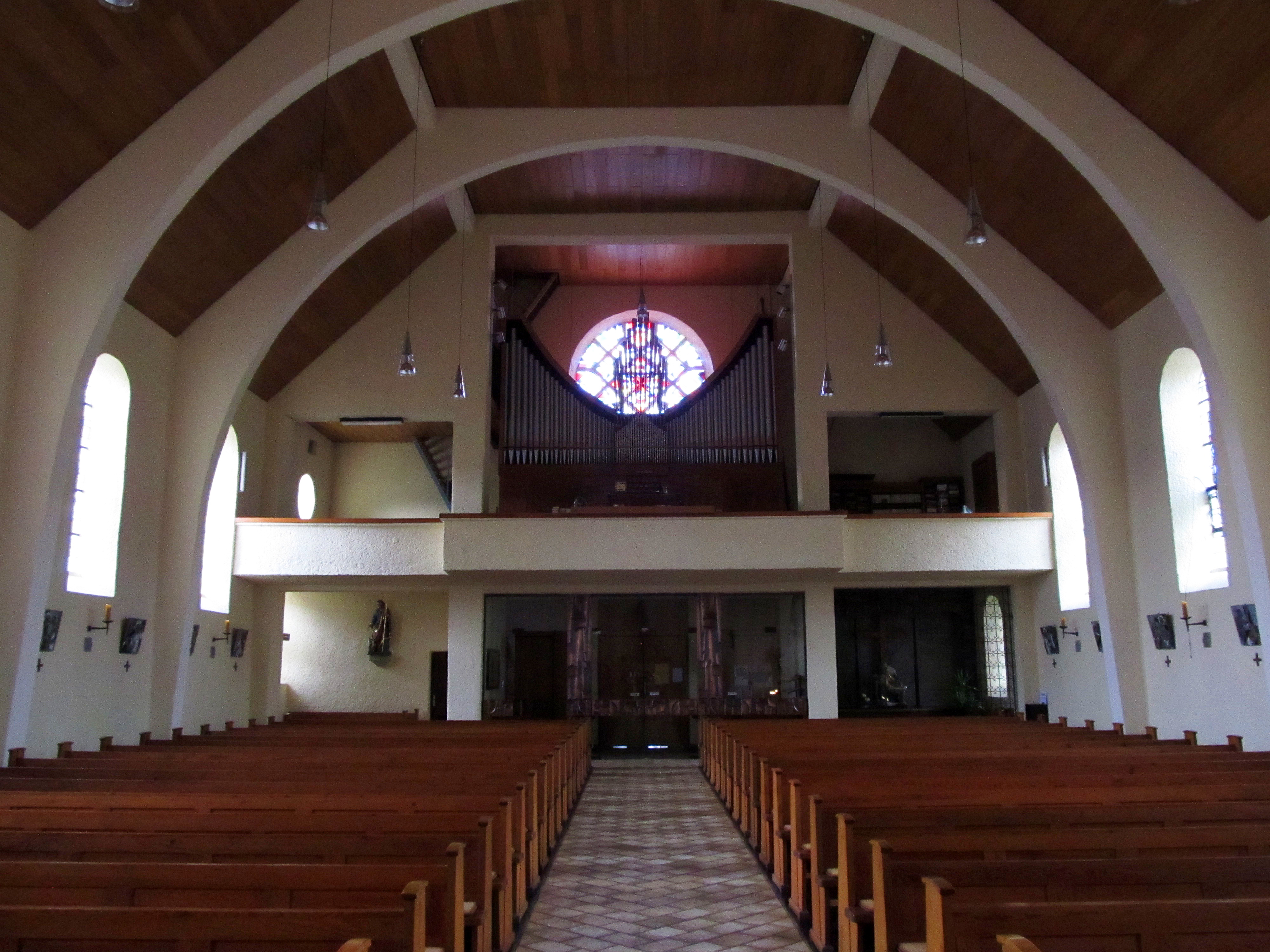 Blick ins Innere der katholischen Pfarrkirche St. Lukas in Bliesransbach, einem Ortsteil der Gemeinde Kleinblittersdorf, Saarland